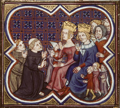 Le roi Charles V et sa famille conversant avec deux franciscain. Besançon - BM - ms. 0434 - f. 046.